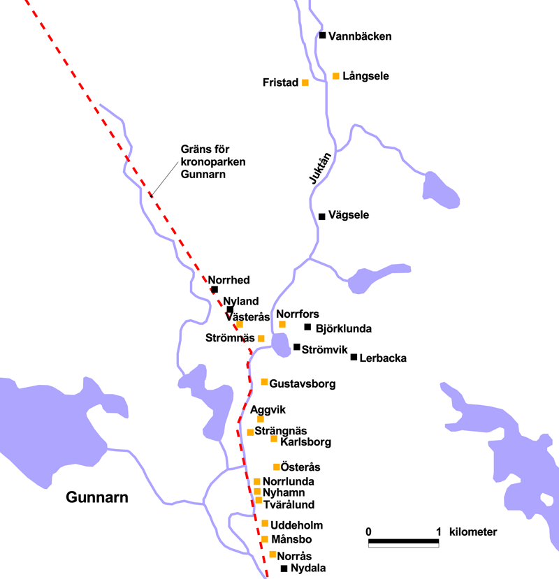 Torp i Juktåkolonin på kronoparken Gunnarn. De torp som legaliserades 1907 är markerade med orange. Övriga tillkom fram till 1926.